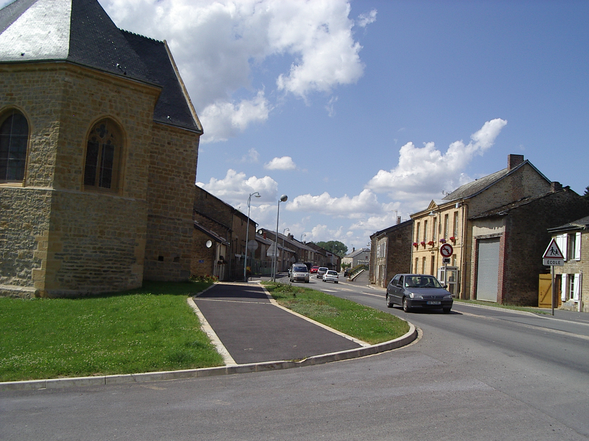 Église Saint-Martin de Cliron, departement des Ardennes, France .